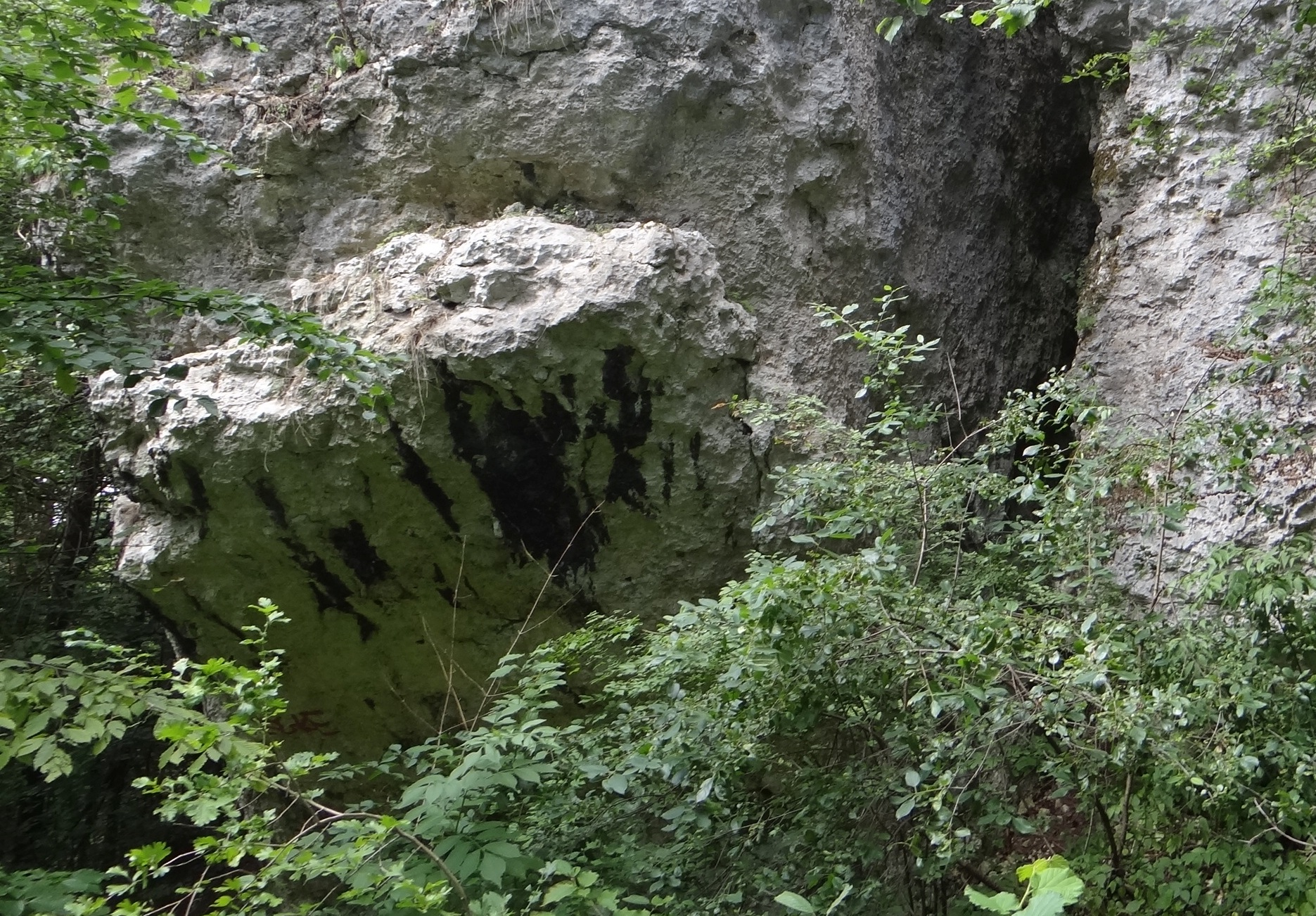 Okap koło Wapiennika w Pomorzańskich Skałach